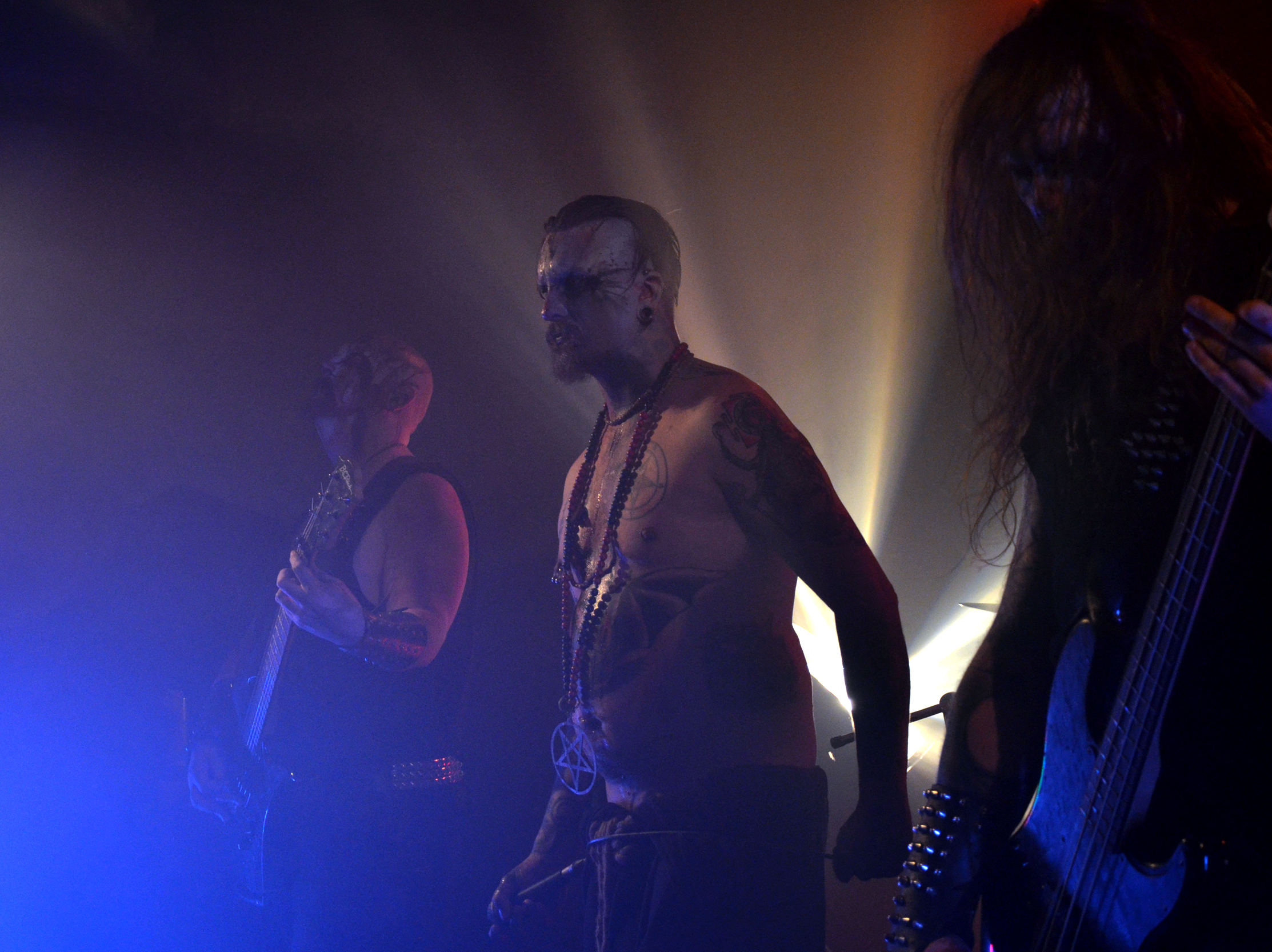 Horna au Sequane Fest à Blamont, le 19 Avril 2014.